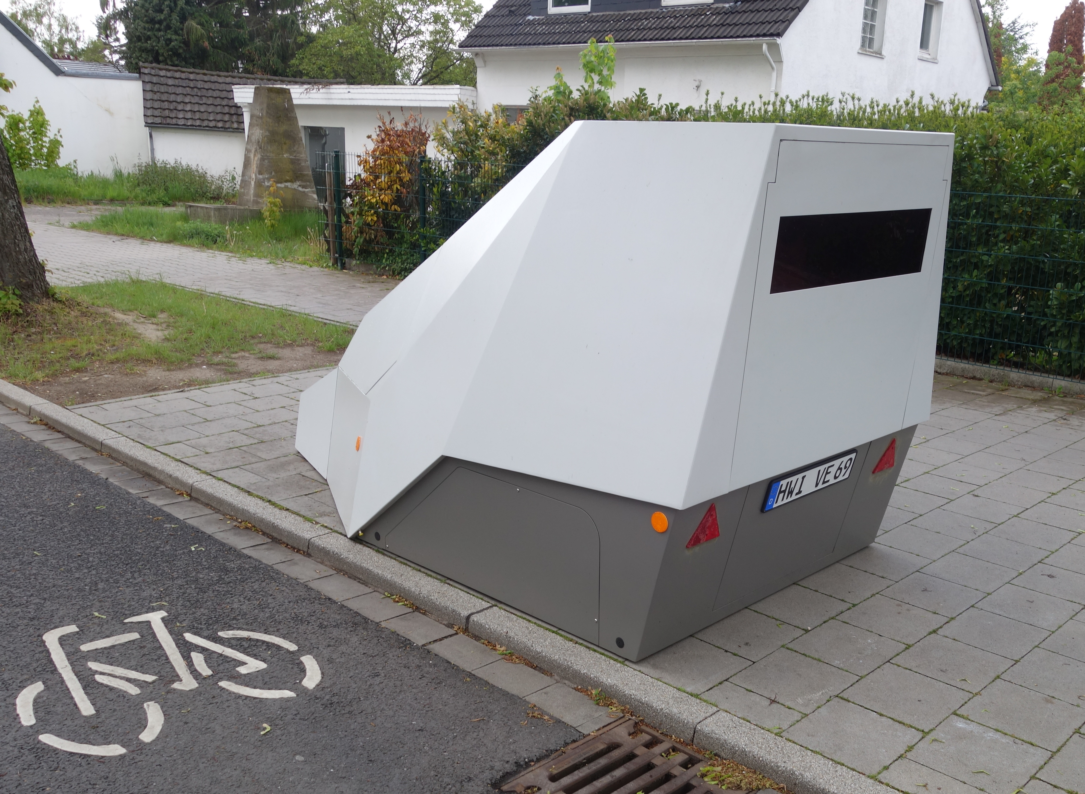 Radar-Blitzer, als Auto getarnt, Höhe Niederrheinstraße 224, Düsseldorf, 2019. Als Auto getarnter mobiler Blitzer in Düsseldorf